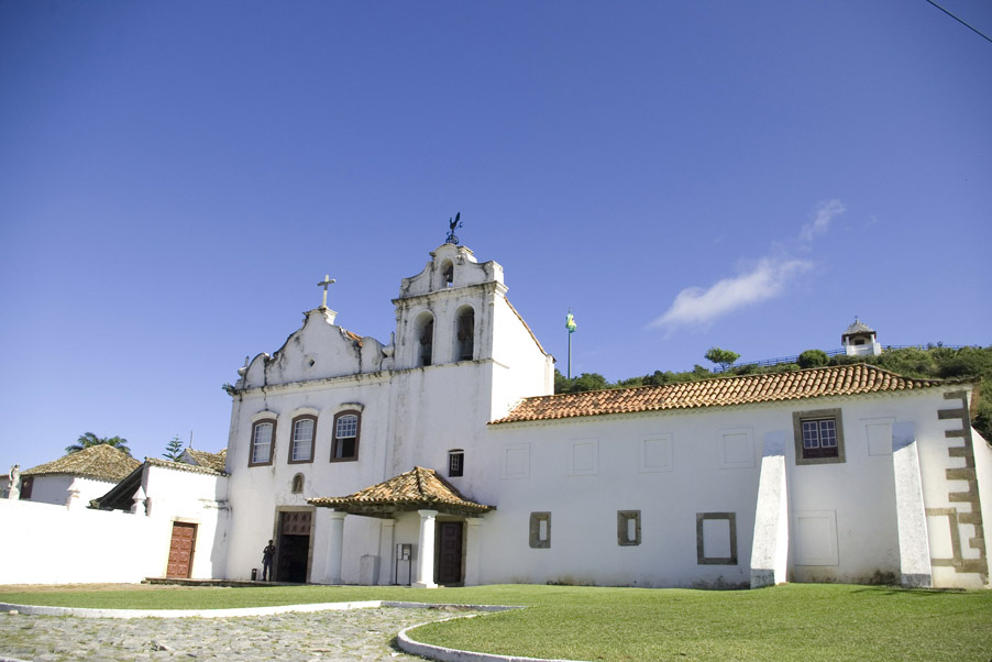 Endereço: Largo de Santo Antônio, S/Nº – Cabo Frio – RJ. Tel: (22)2643-6898 Horários: De terça a sexta, das 10h às 12h e das 13h às 17h. Nos finais de semana e feriados, abre das 14h às 18h Foto: Divulgação IBRAM migre.me/cJCxT